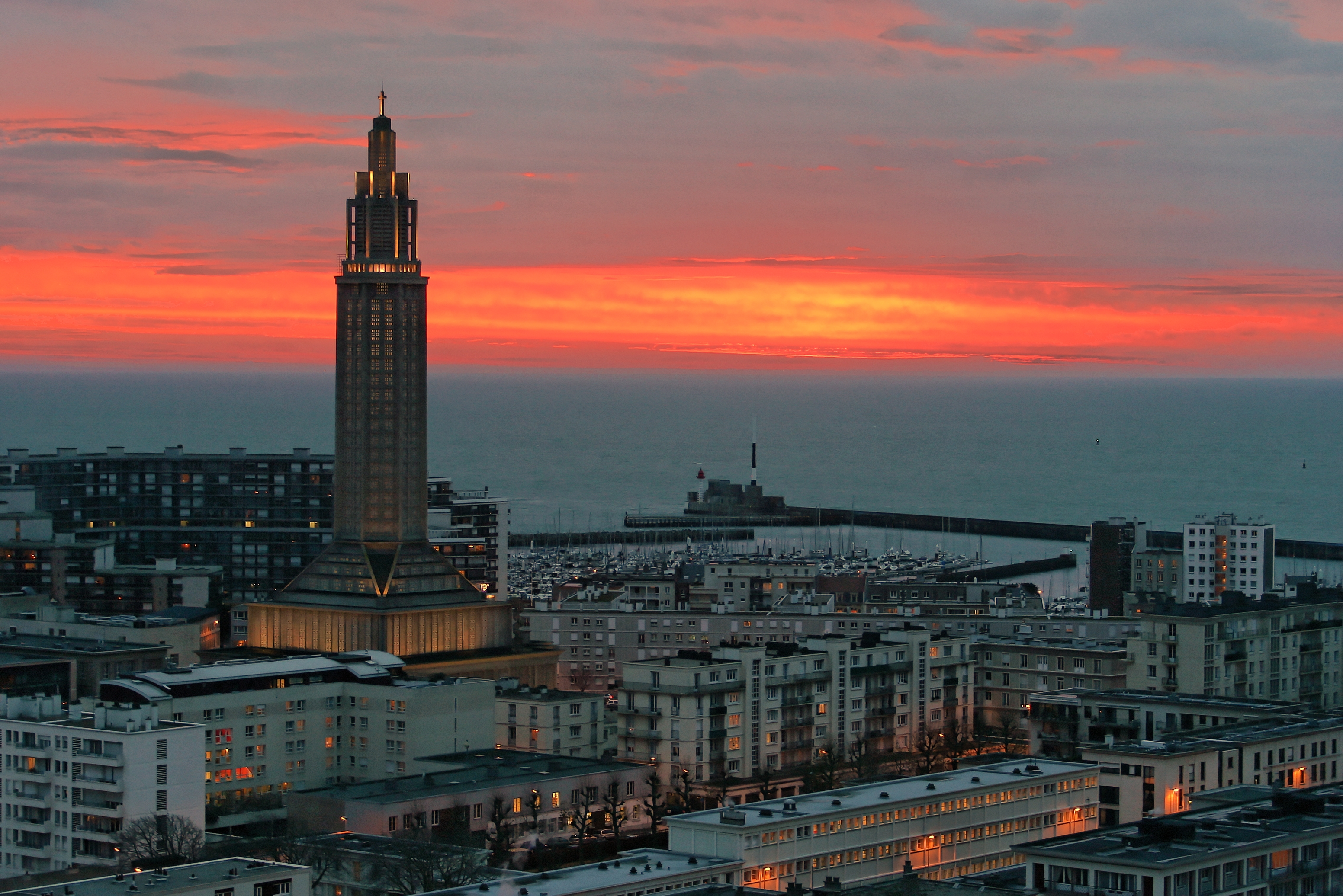 Le centre reconstruit et son coucher de soleil impressionniste